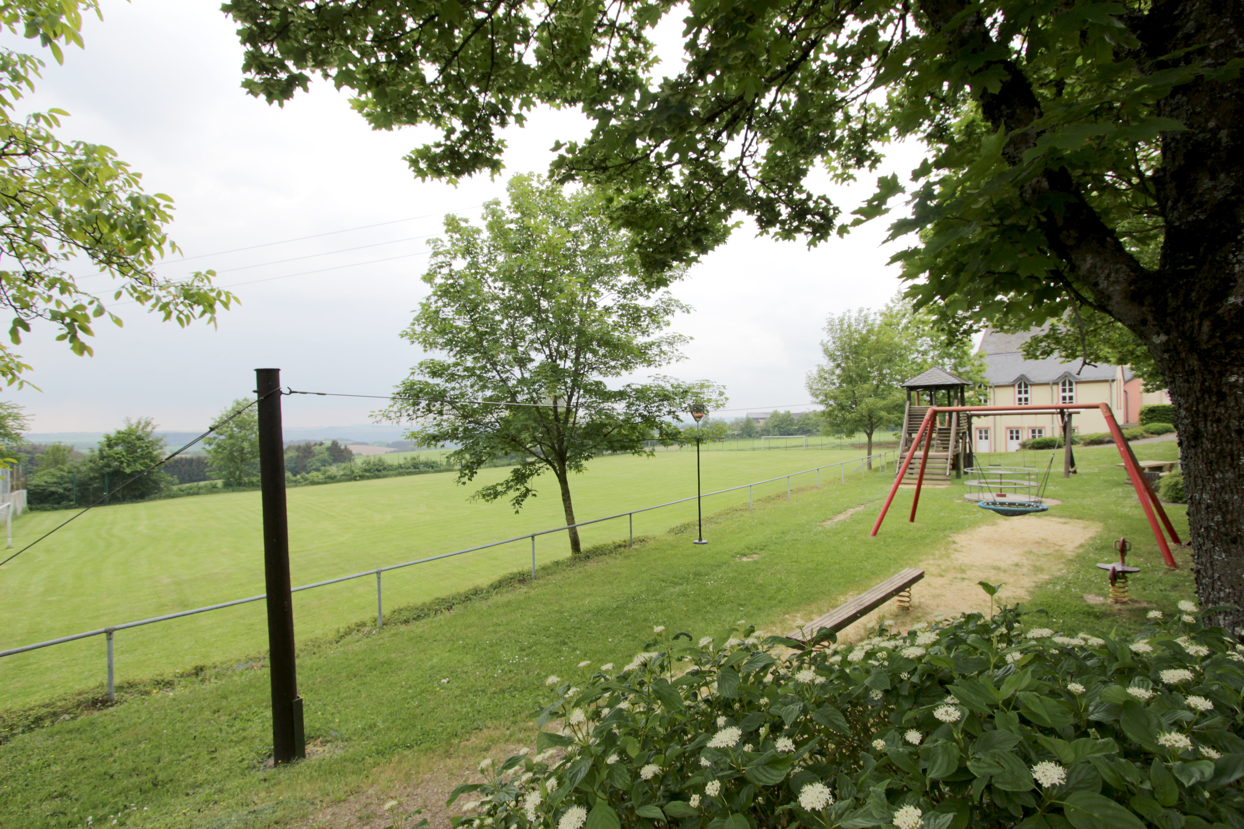 54689 Olmscheid, bei Hauptstraße 35. Spielplatz neben dem Gemeinschaftshaus. Aufnahme von 2018.